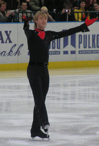 Jewgeni Pluschenko während der Russischen Meisterschaften 2005